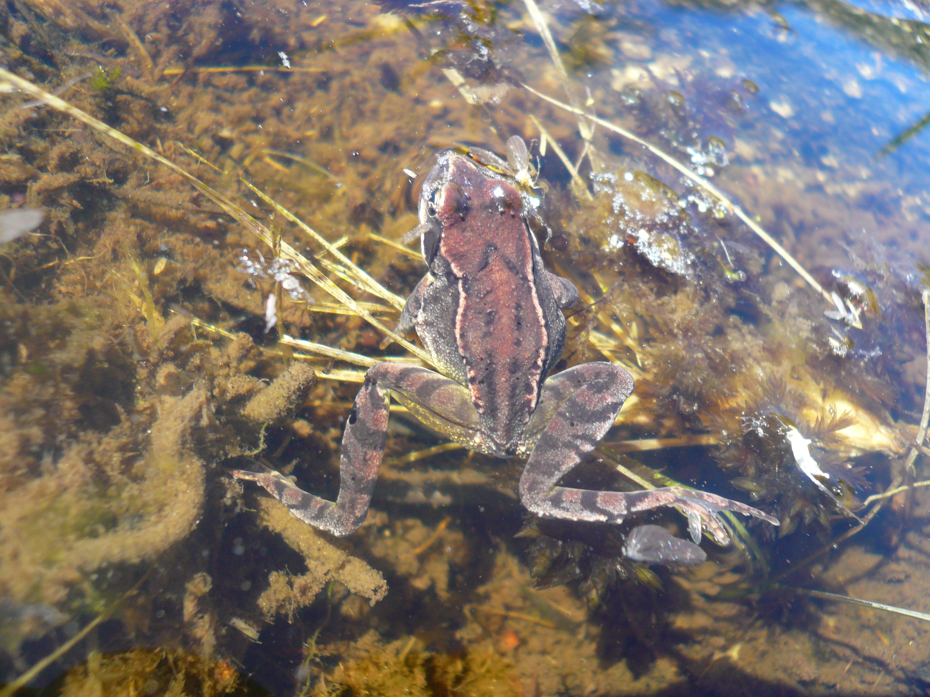 Tossa Plana de Lles-Puigpedrós (Cerdanya, Alt Urgell) (Lles de Cerdanya, les Valls de Valira, Meranges i altres). Fotos preses en una excursió del refugi de Malniu als estanys de Malniu i Mal. This is a a photo of a natural area in Catalonia, Spain, with id: ES510205 Object location42° 27′ 00″ N, 1° 42′ 00″ E